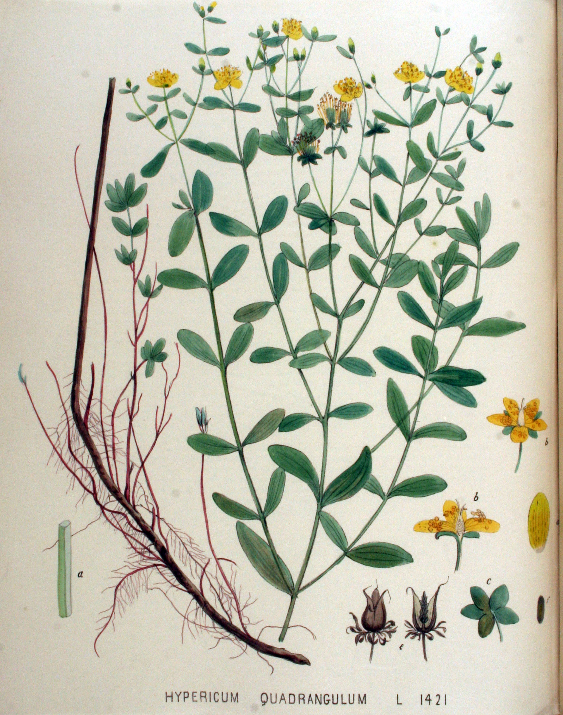 Hypericum maculatum Crantz (Syn. Hypericum quadrangulum auct. non L., nom. rejic.)